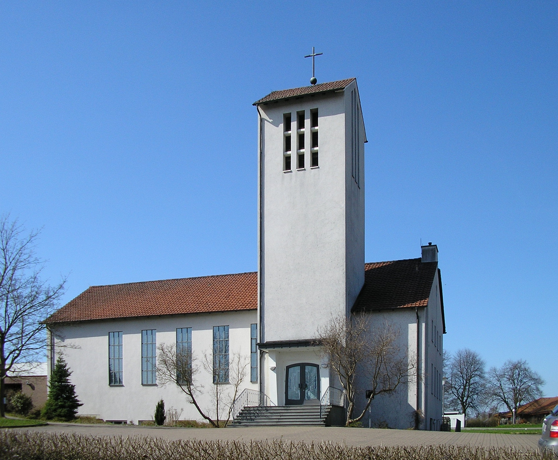 Ev.-luth. Kirche Westerenger.JPG